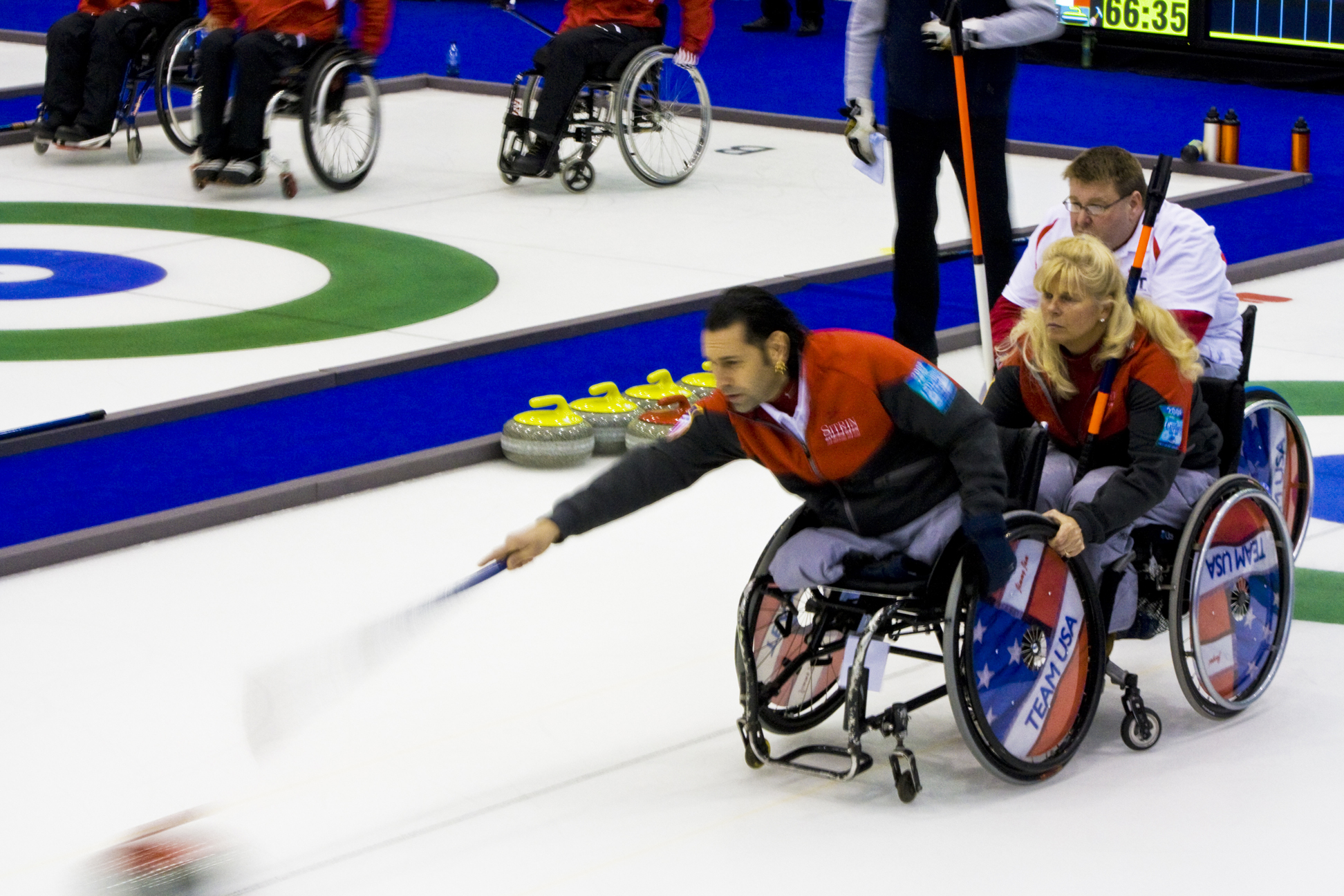 Team USA (l to r): Jimmy Jam Joseph, Jacqui Kapinowski and Jim Pierce